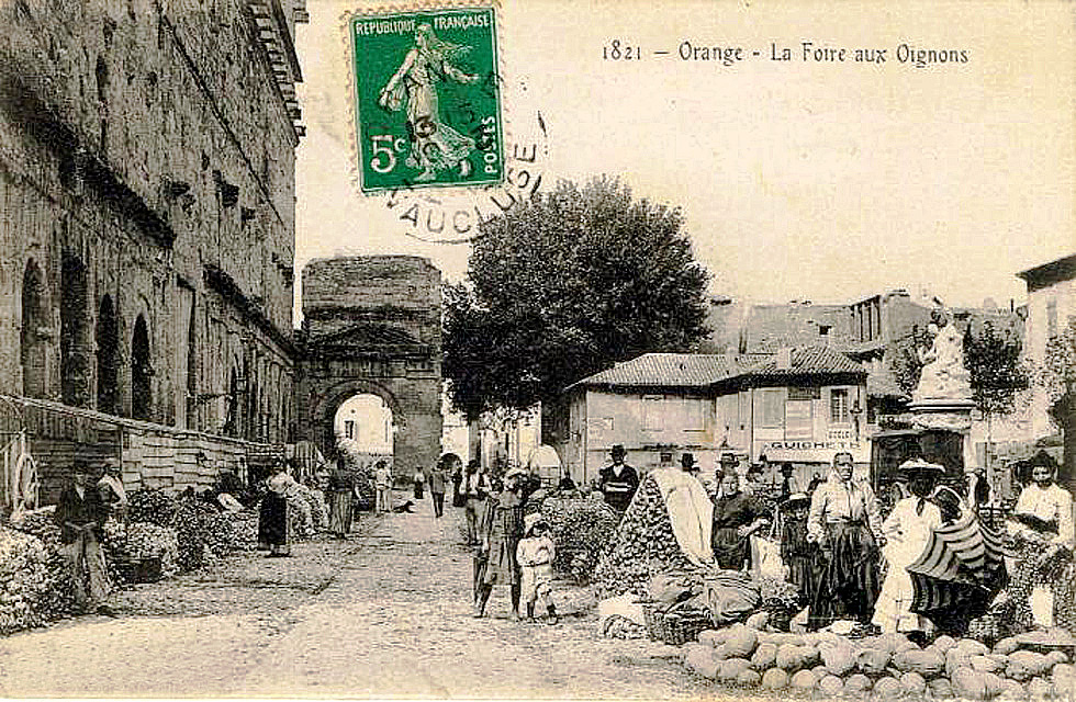 Orange Foire aux oignons en 1905